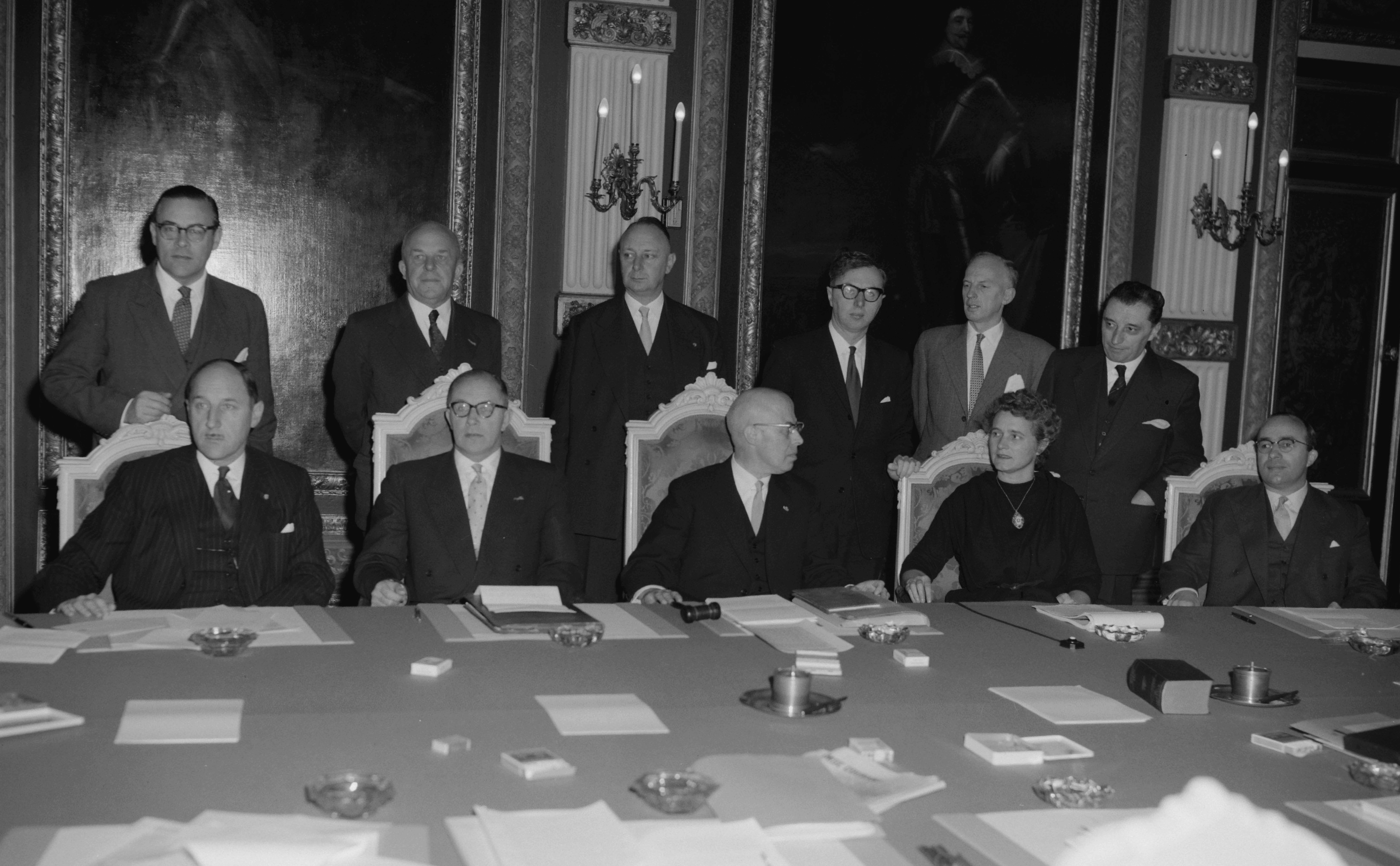 Tweede kabinet Beel (1958-1959), het zogeheten intermezzokabinet. Zittend v.l.n.r: Luns, Struycken, Beel, Klompé, Cals. Staand v.l.n.r: Witte, Staf, Helders, Zijlstra, Middelburg, Van Aartsen. Trèveszaal, Binnenhof, Den Haag, 23 december 1958.